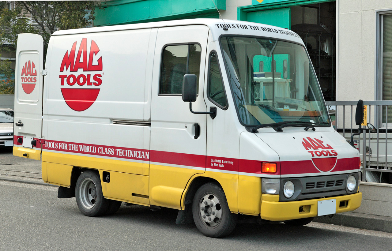 Toyota Urban Supporter